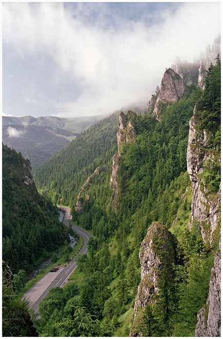 Tiesňavy, Malá Fatra, district Žilina, Slovakia autor: Prazak Date 28. 6. 06